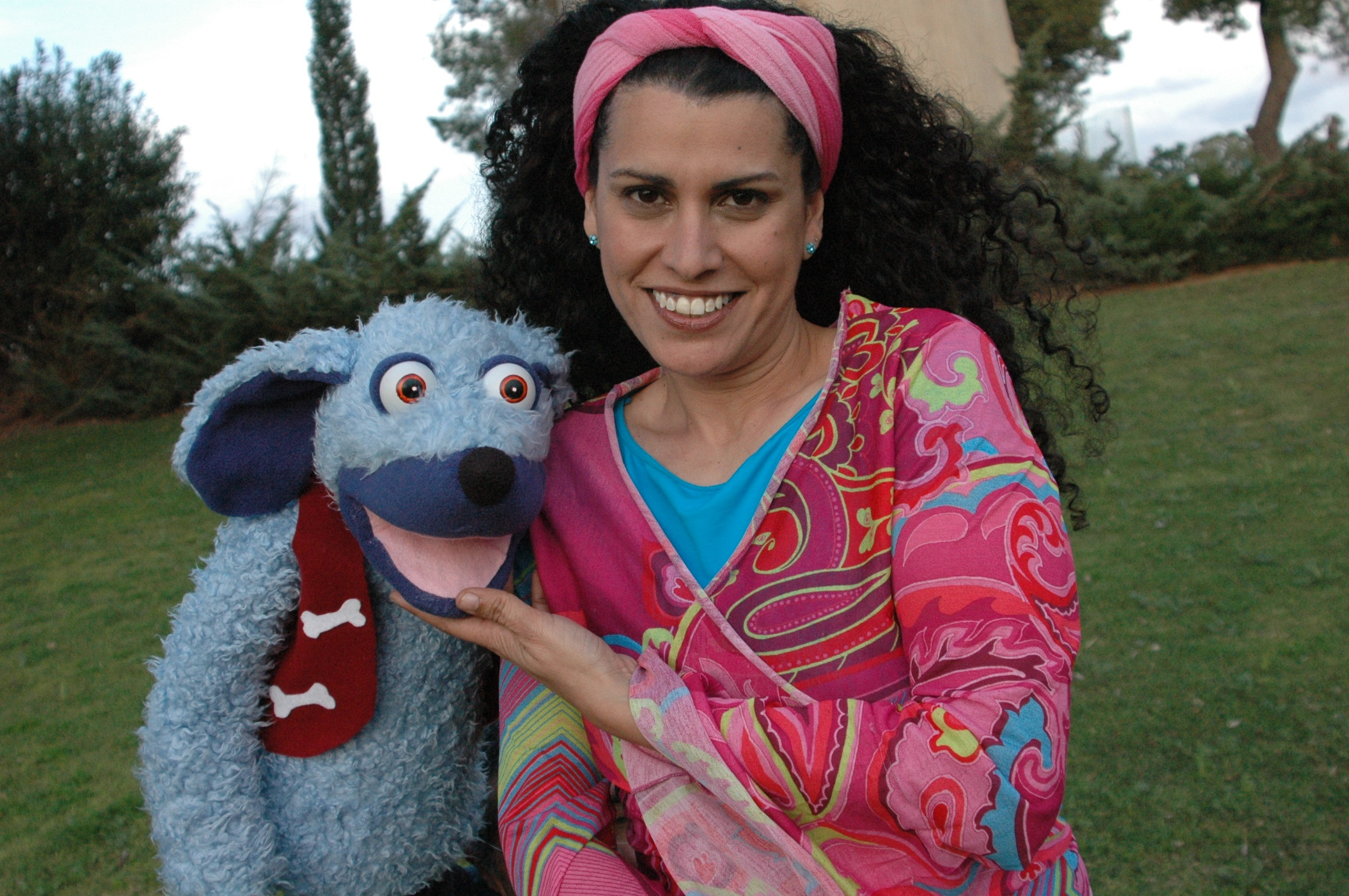 2004 פזית נוני בצילומי הקלטת נשיבוק - בניית בובה פזית נוני